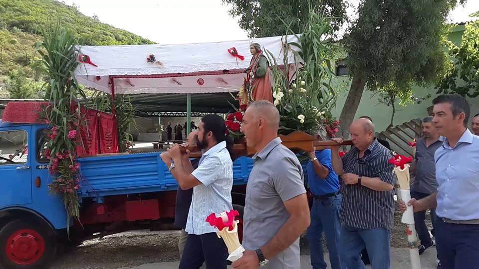 Il simulacro di Santa Barbara arriva nella miniera per la Santa Messa durante i festeggiamenti di Luglio.